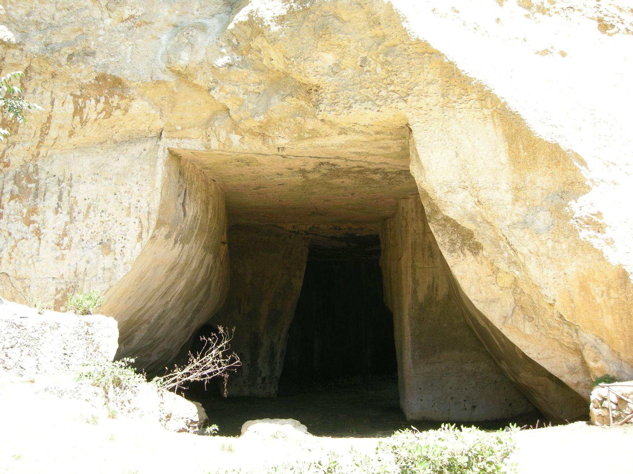 Siracusa, neapolis, latomia dei cordari